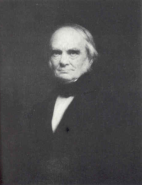 Christian Petersen (1802–1872) Philologe, Gymnasialprofessor und Bibliothekar in Hamburg Gemälde, seit 1873 im Besitz der ehemaligen Stadtbibliothek, heute Staats- und Universitätsbibliothek Hamburg